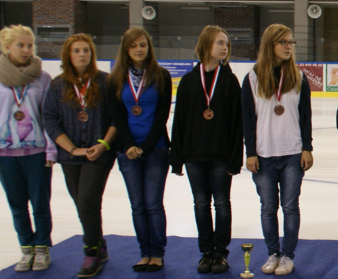 Od prawej: A. Lipińska (s), D. Chmarra, A. Ignatowska, Z.Aniolkowska, J. Janowska